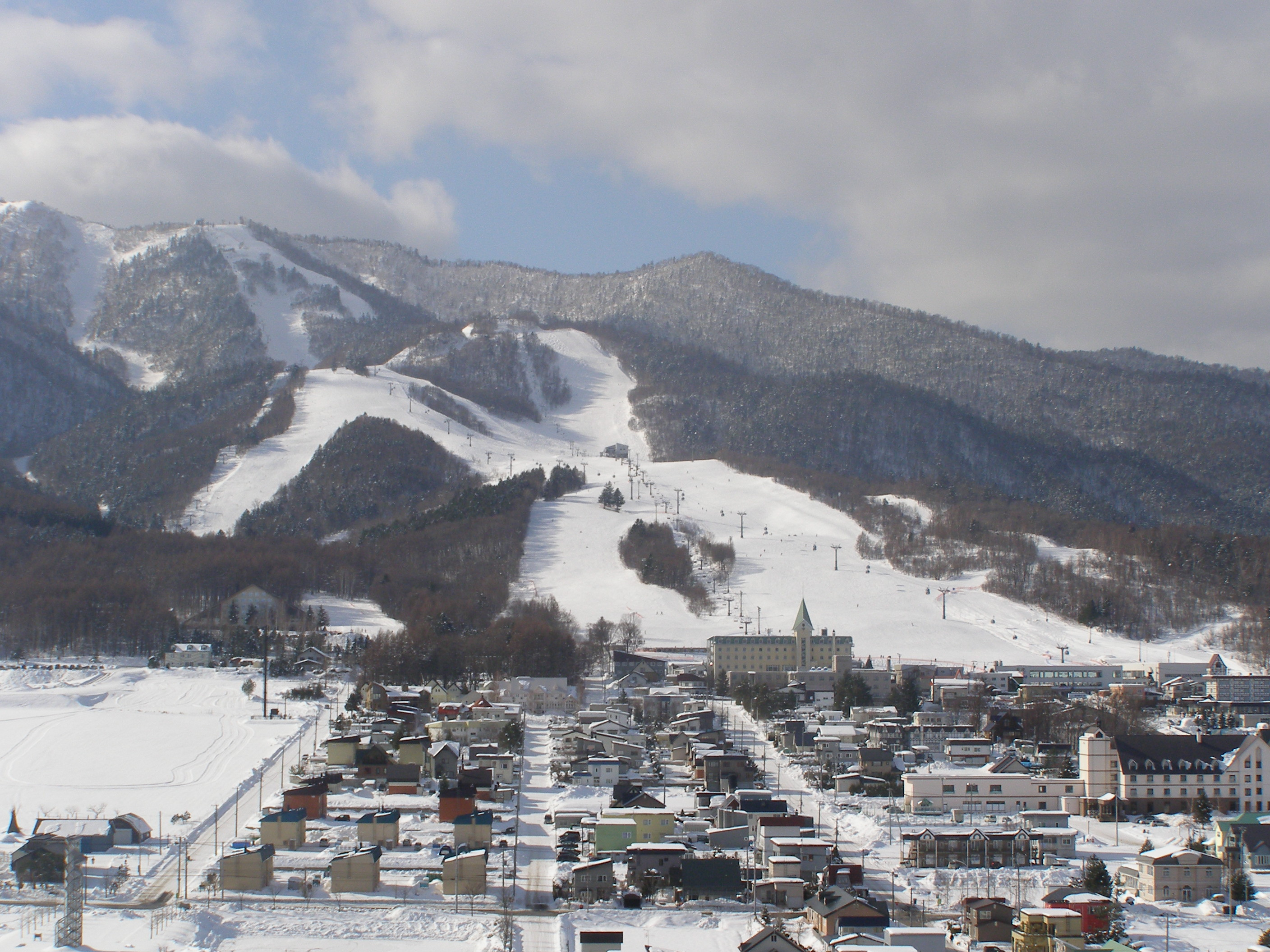 Furano Snow Resort Kitanomine aria (Hokkaido, JAPAN)富良野スキー場北の峰ゲレンデ (北海道富良野市)